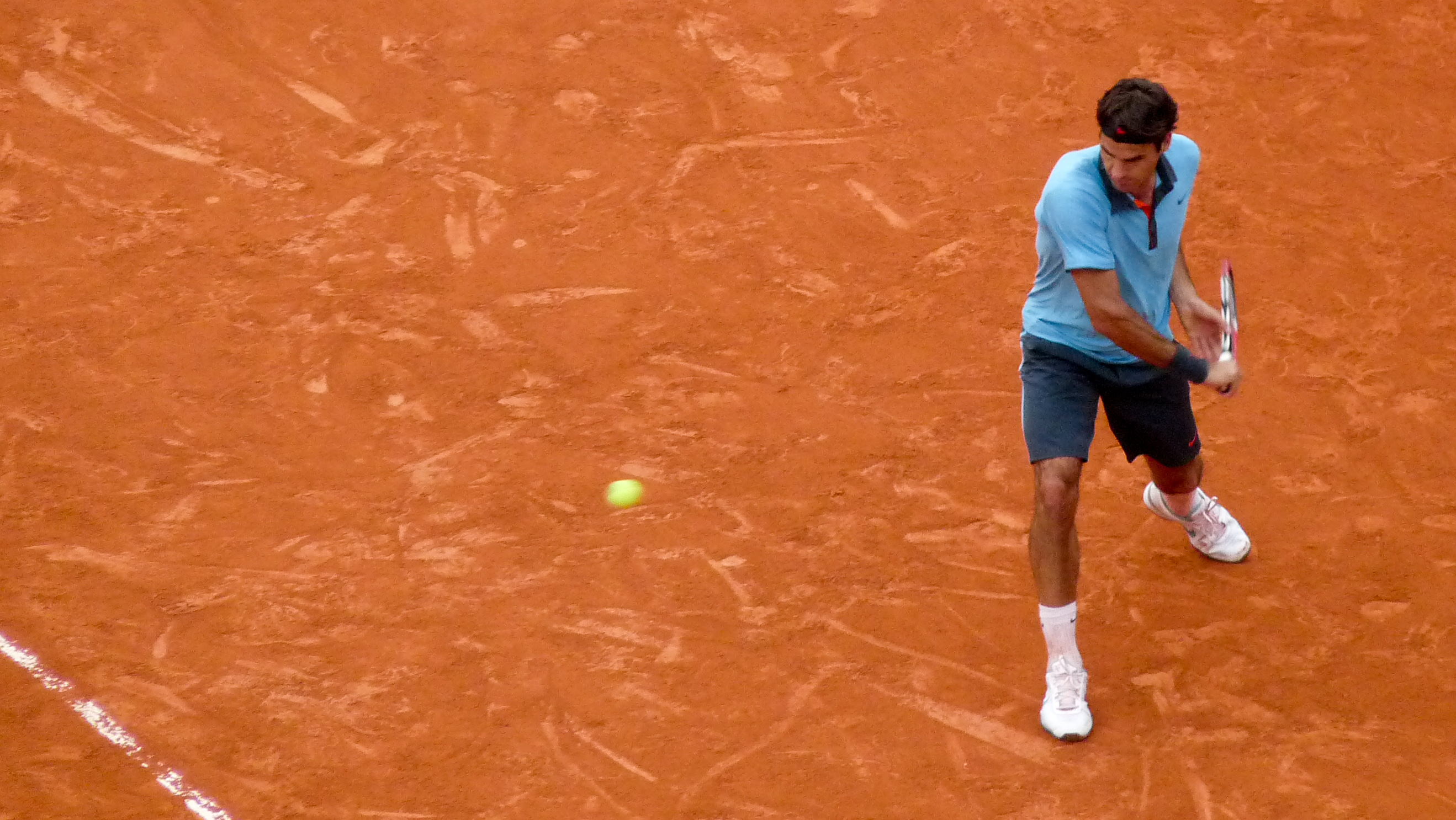 Roger Federer against Juan Martín del Potro in the 2009 French Open semifinals